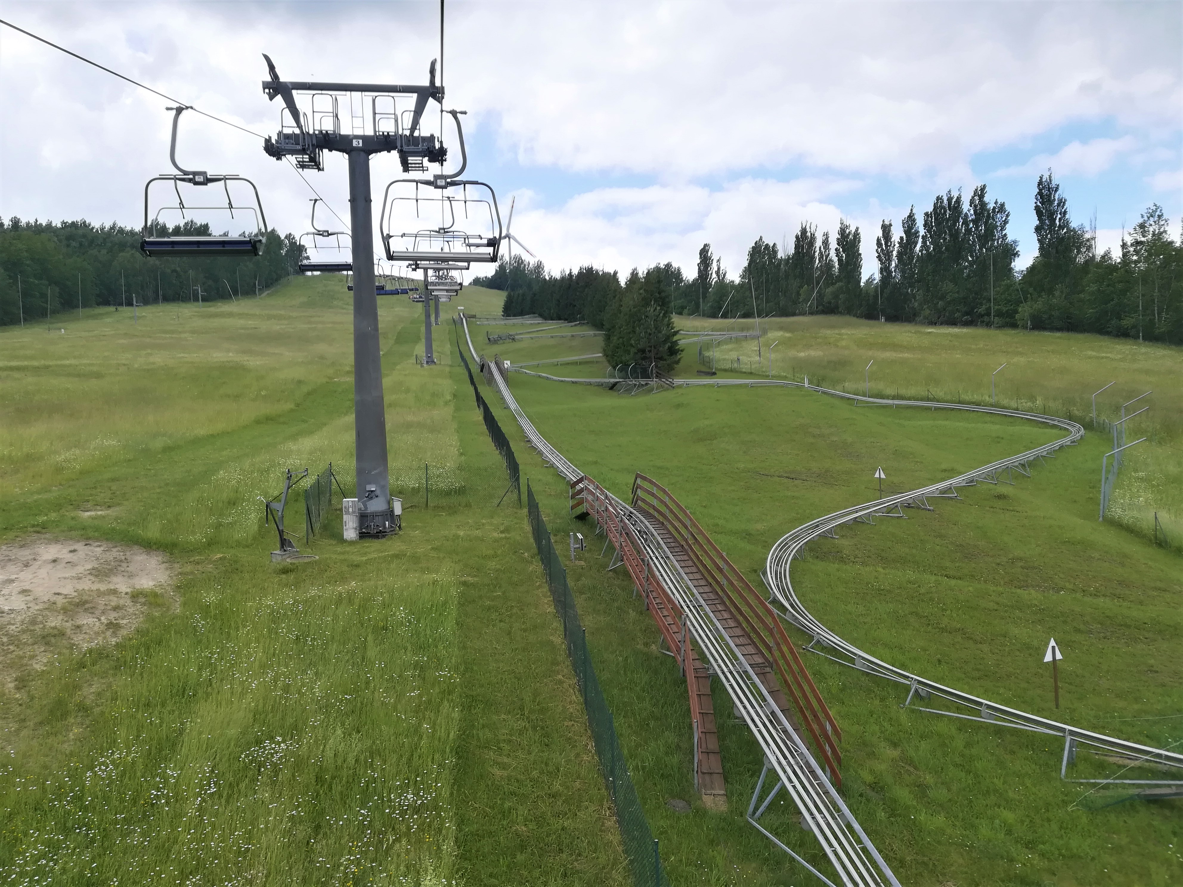 Góra Kamieńska w woj. łódzkiem.